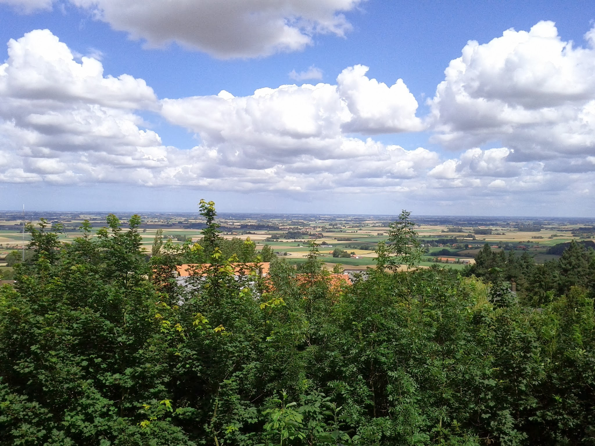 la plaine de Flandre occidentale, depuis Cassel